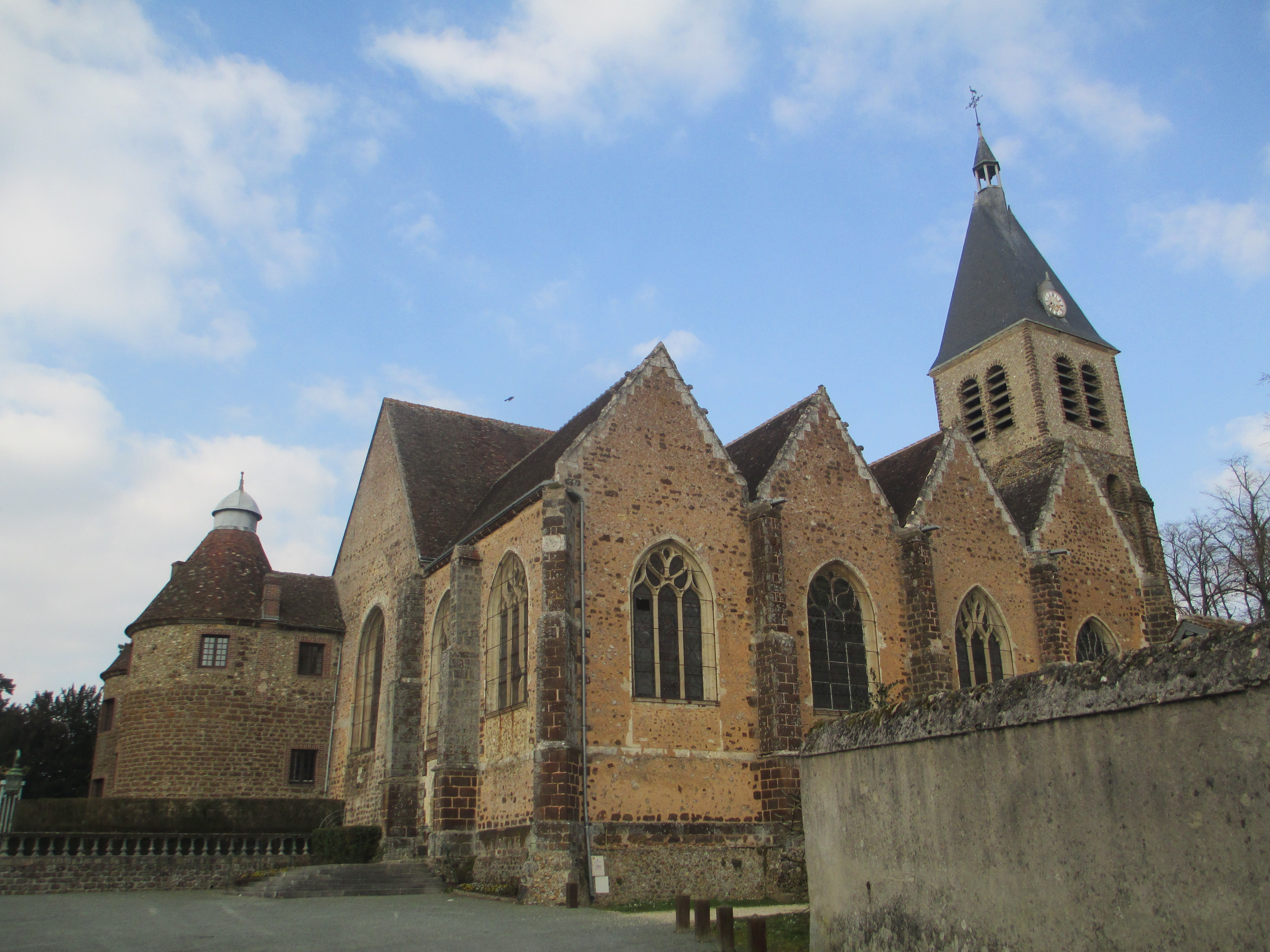 Église Saint-Lubin de Pontgouin vue depuis la rue du cardinal Pie.